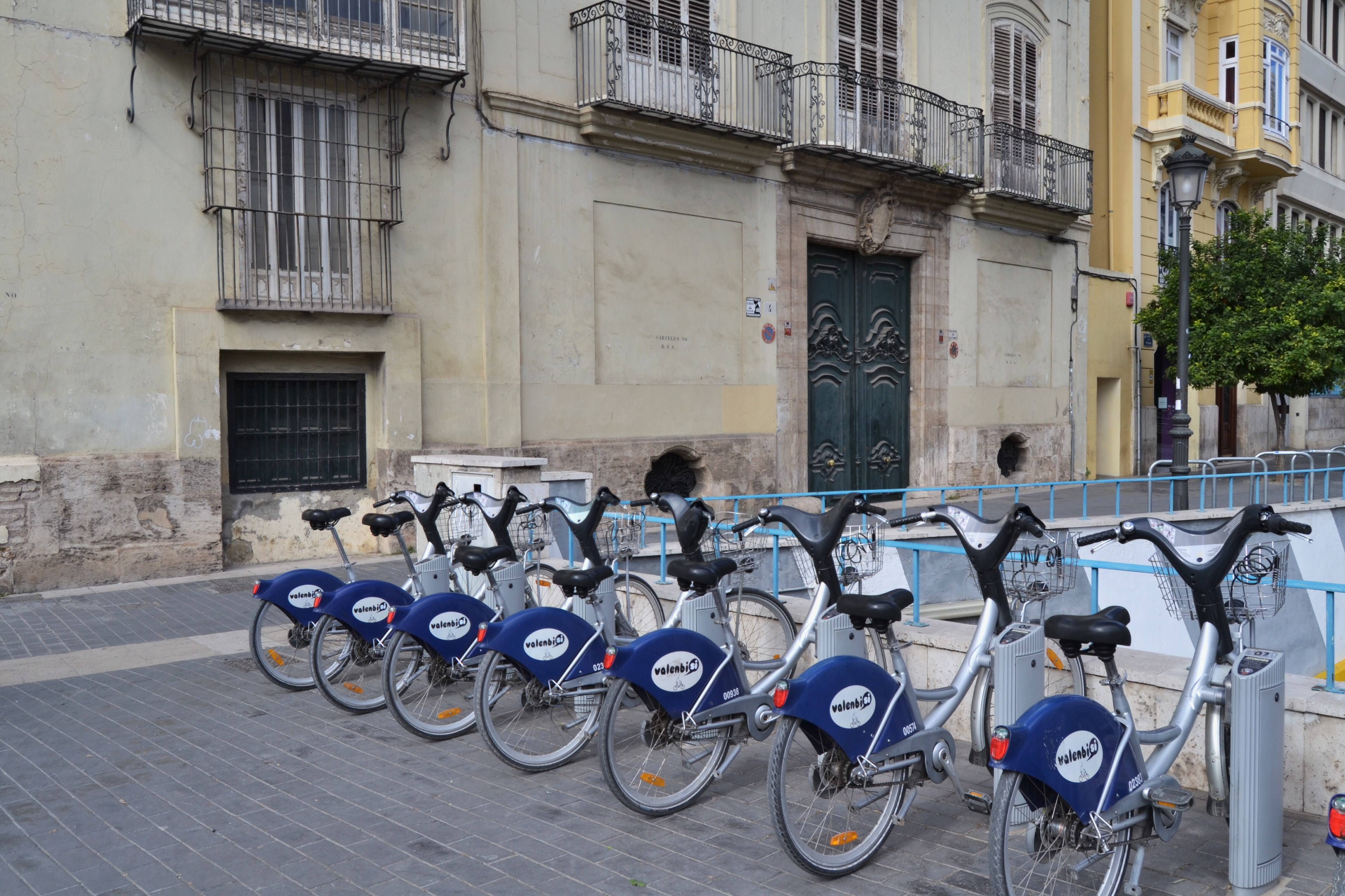 Valenbisi a la plaça de Tetuan de València.